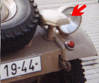 Notek an der VW Typ 82 wagen